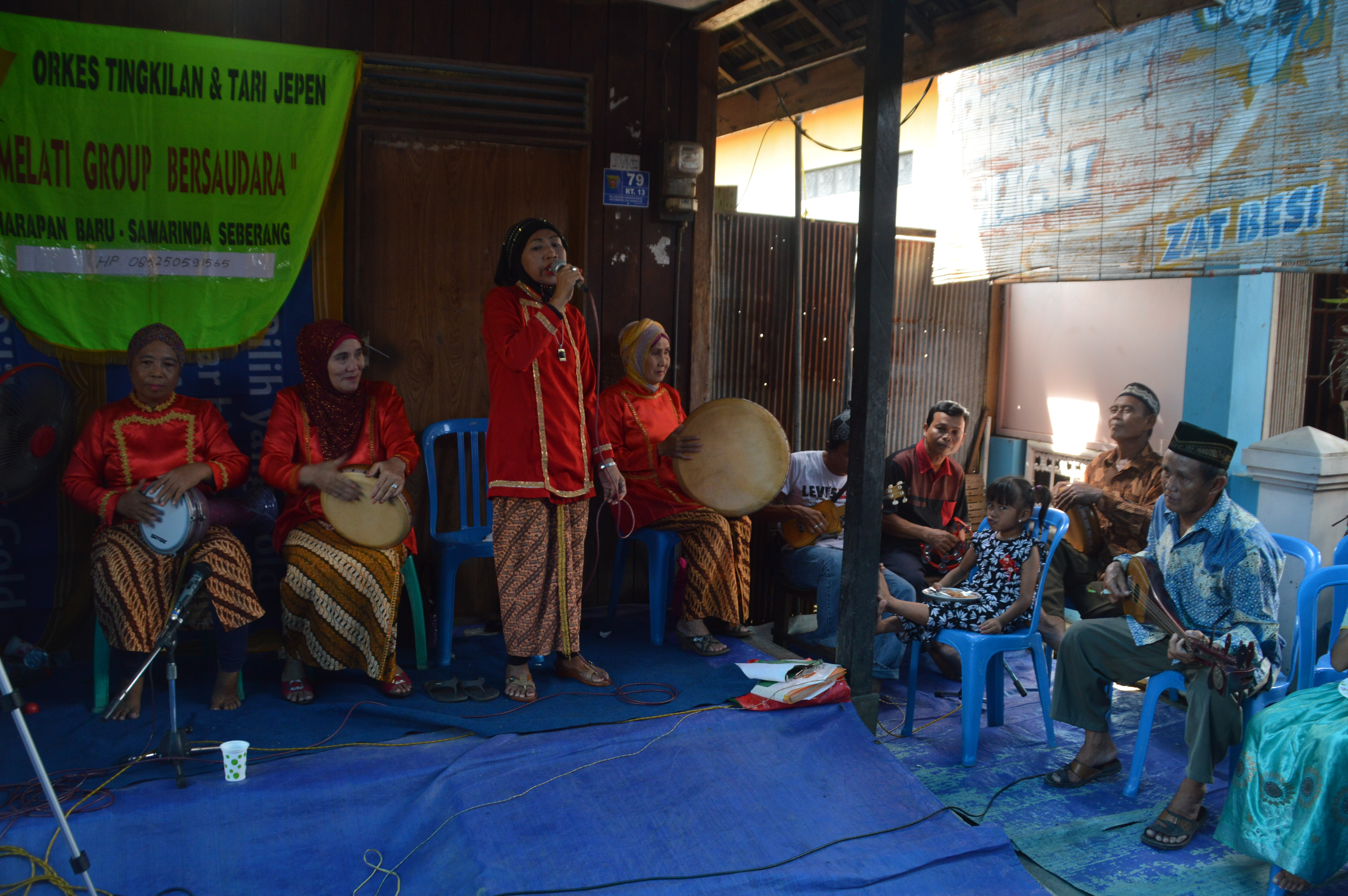 Tingkilan adalah musik tradisional etnis Kutai di Kalimantan Timur.